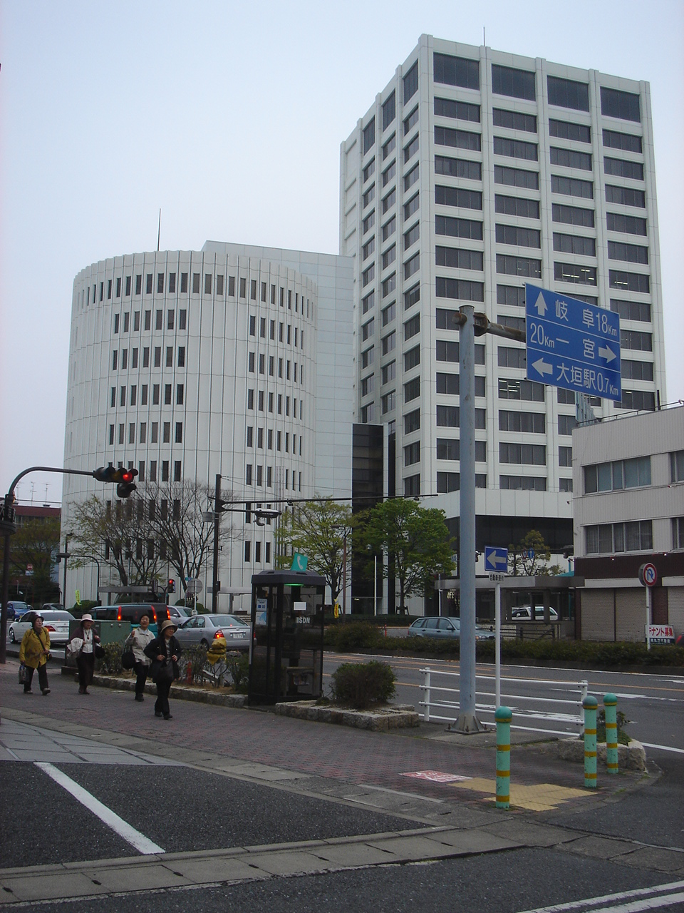 Ogaki-Kyoritsu_Bank_HeadOffice(大垣共立銀行本店),Ogaki,Gifu,Japan(岐阜県大垣市)で撮影